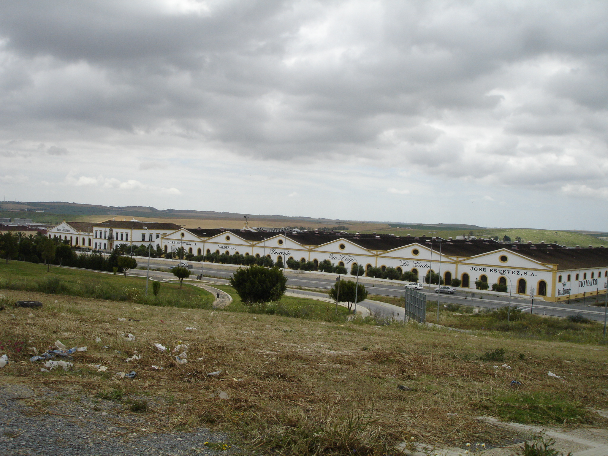 Bodegas Real Tesoro en Jerez de la Frontera. Andalusia (Spain)